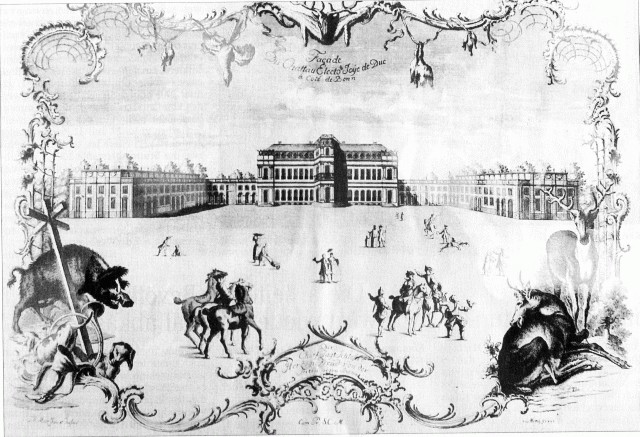 Schloss Herzogsfreude, Kupferstich von 1785